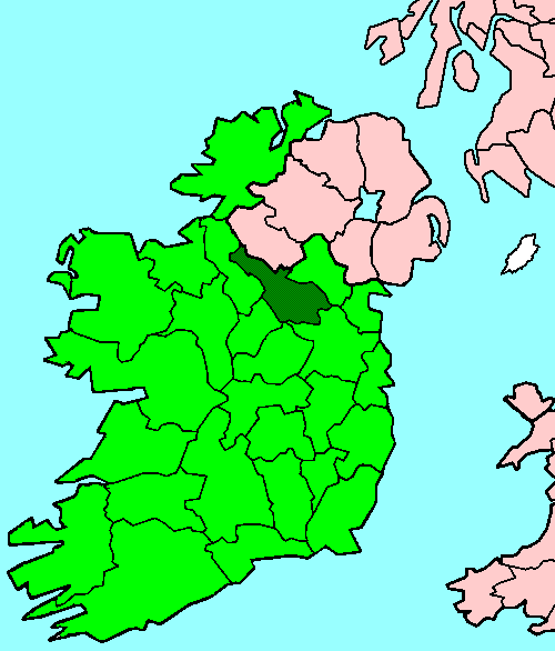 Cavan